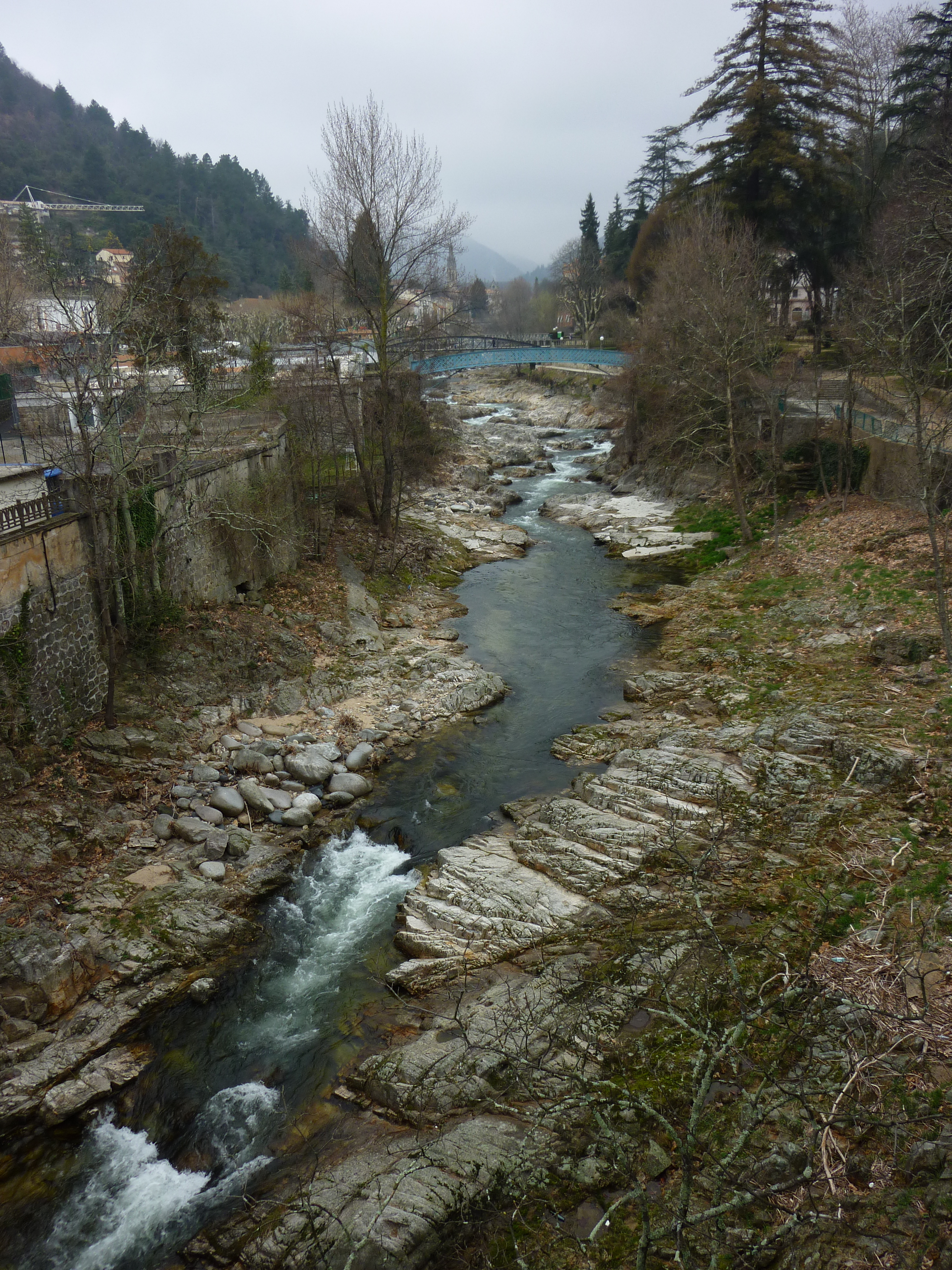 La Volane à Vals les Bains, le long du parc. 1er jour du printemps, débit moyen. (Ardèche 07, France)